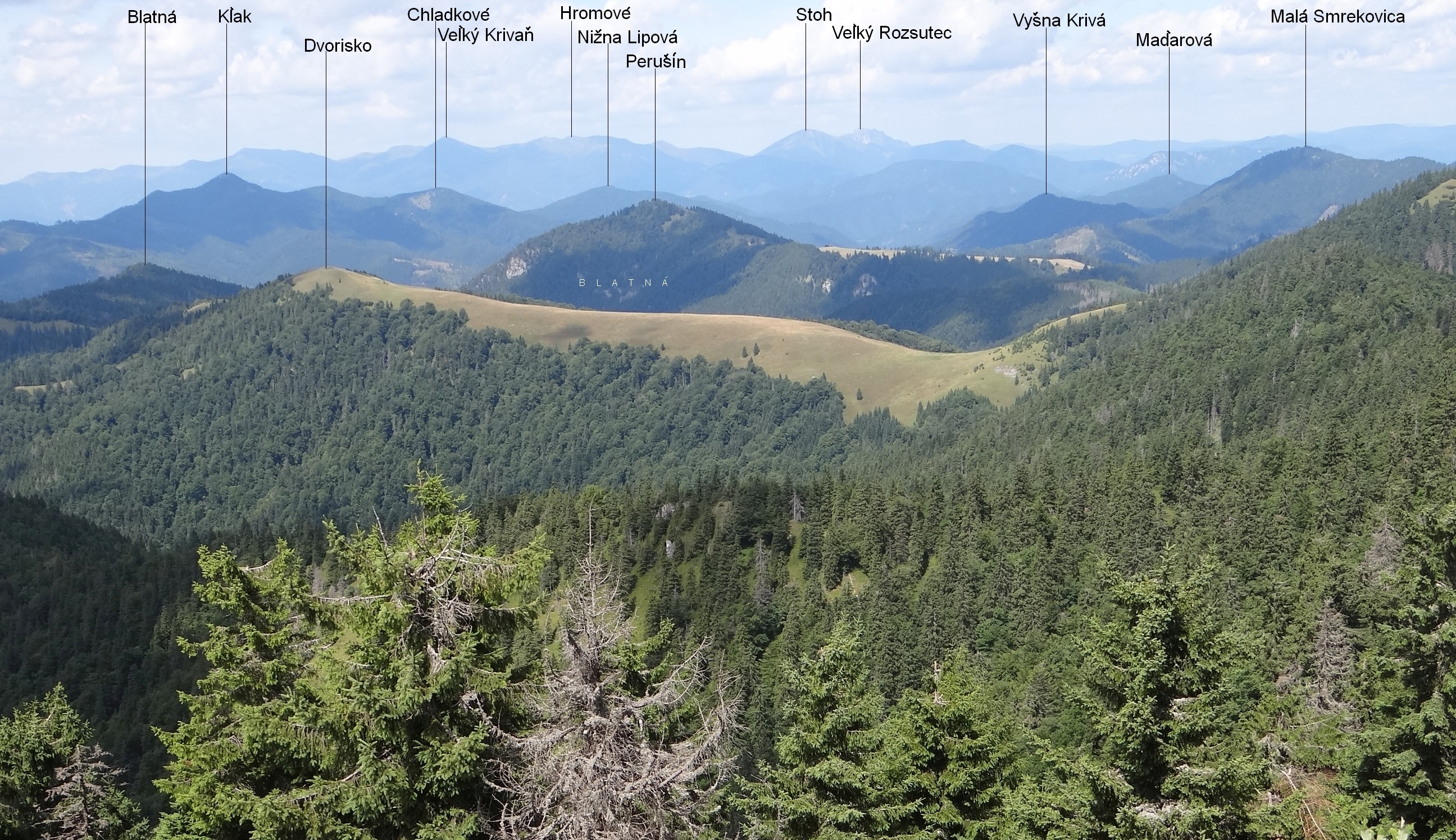 View from Rakytov